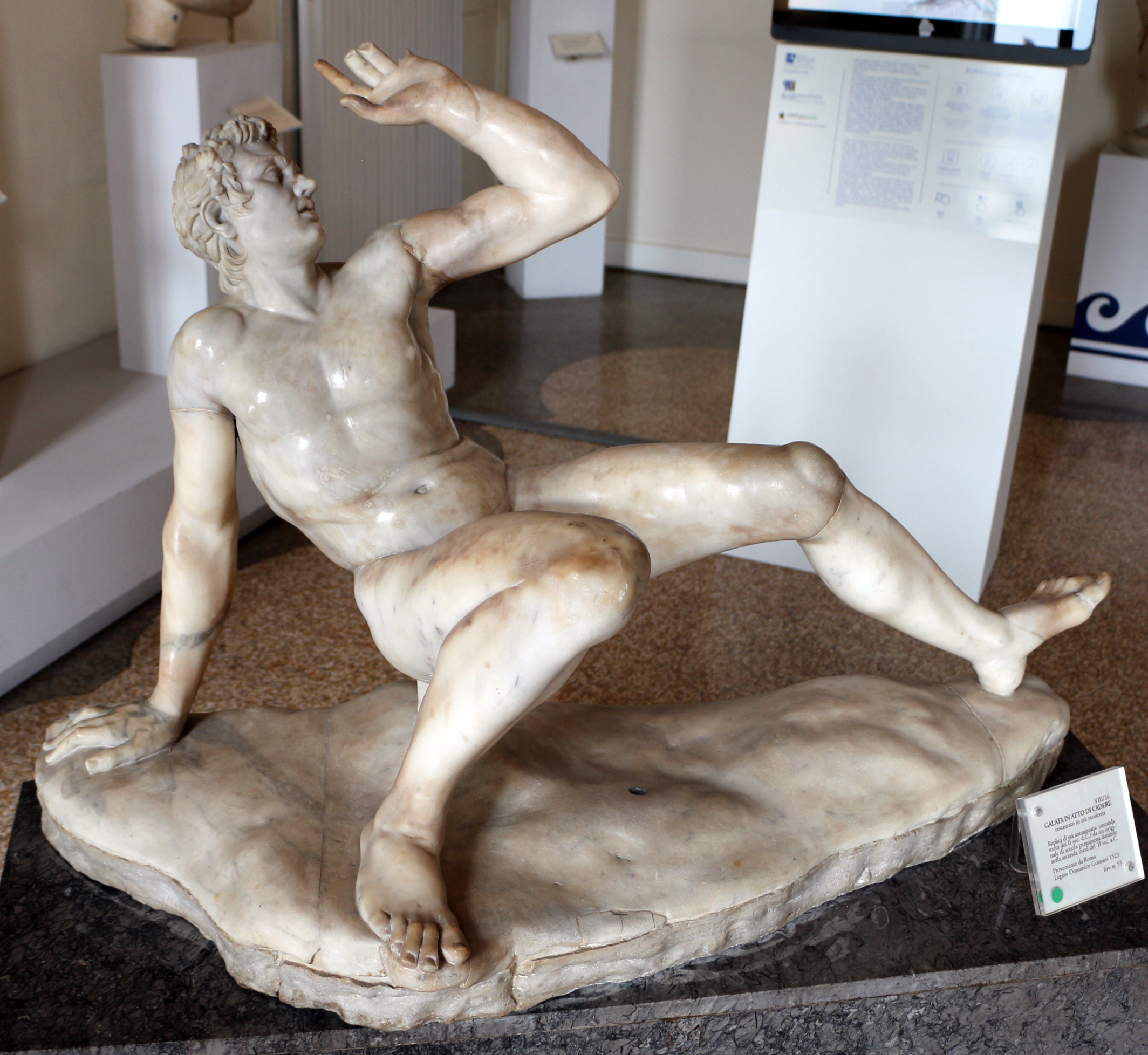 Museo Archeologico Nazionale This is a photo of a monument which is part of cultural heritage of Italy.